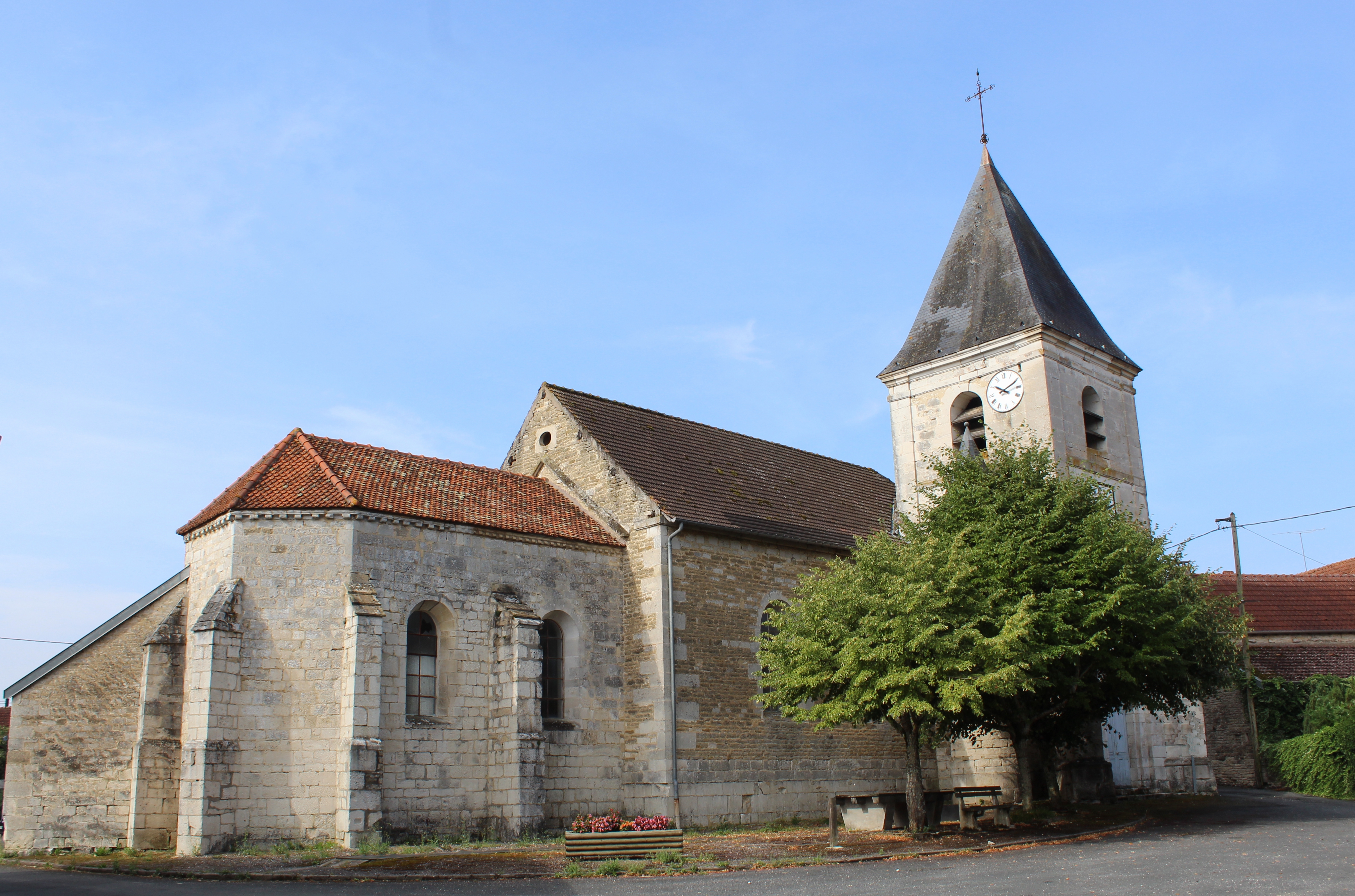 L'église.